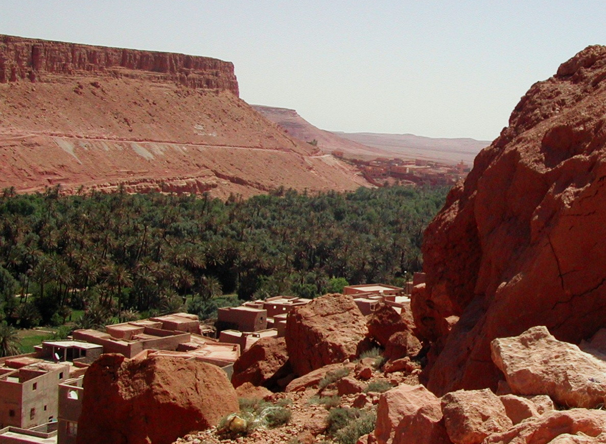 Maroc.-El Kélàa des M'gouna, région de Souss-Massa-Drâa et la province de Tinghir